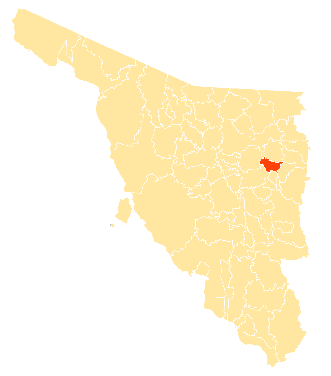 Municipio dentro de Sonora, México.